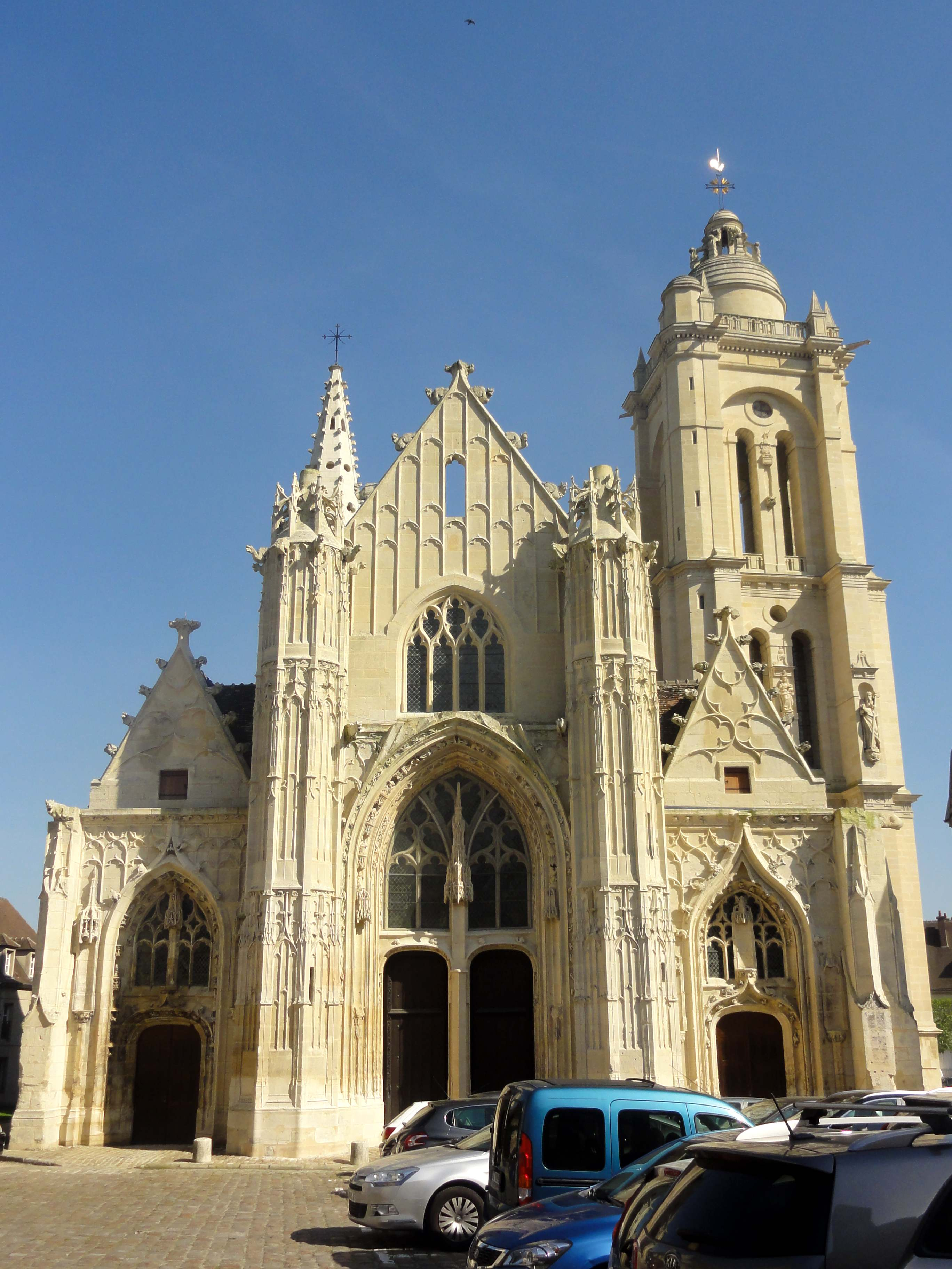 Église Saint-Pierre de Senlis - voir le titre du fichier.